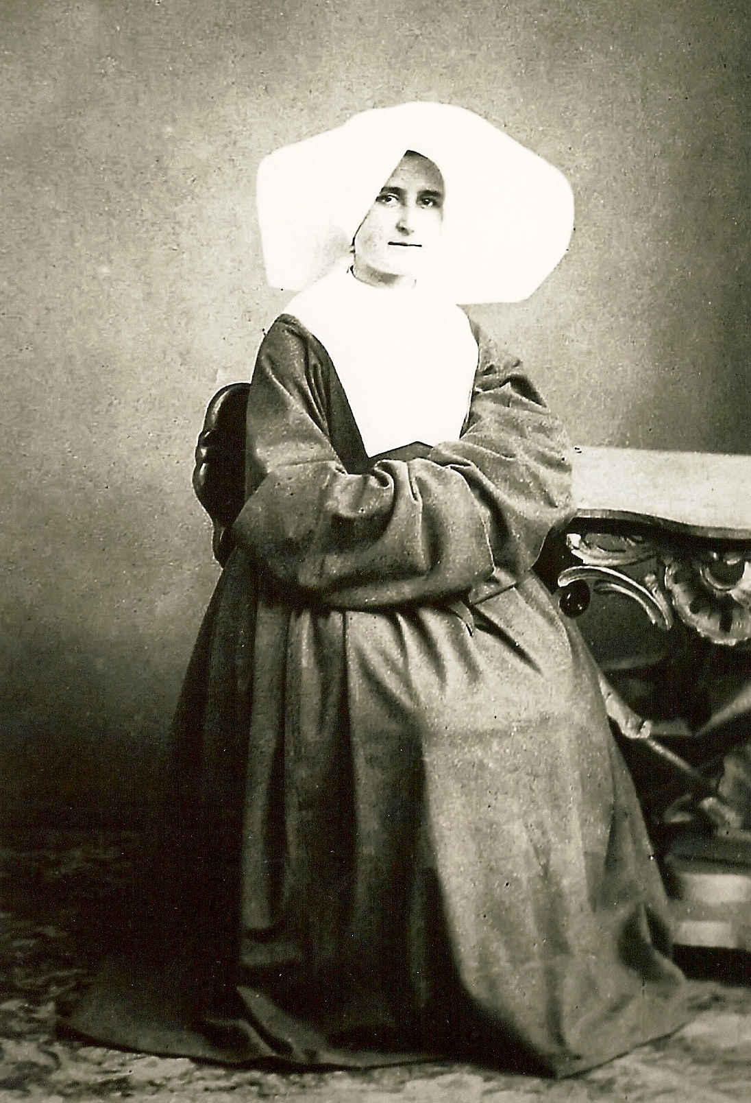 Sister Marie de Mandat_Grancey, DC., (1839-1915)